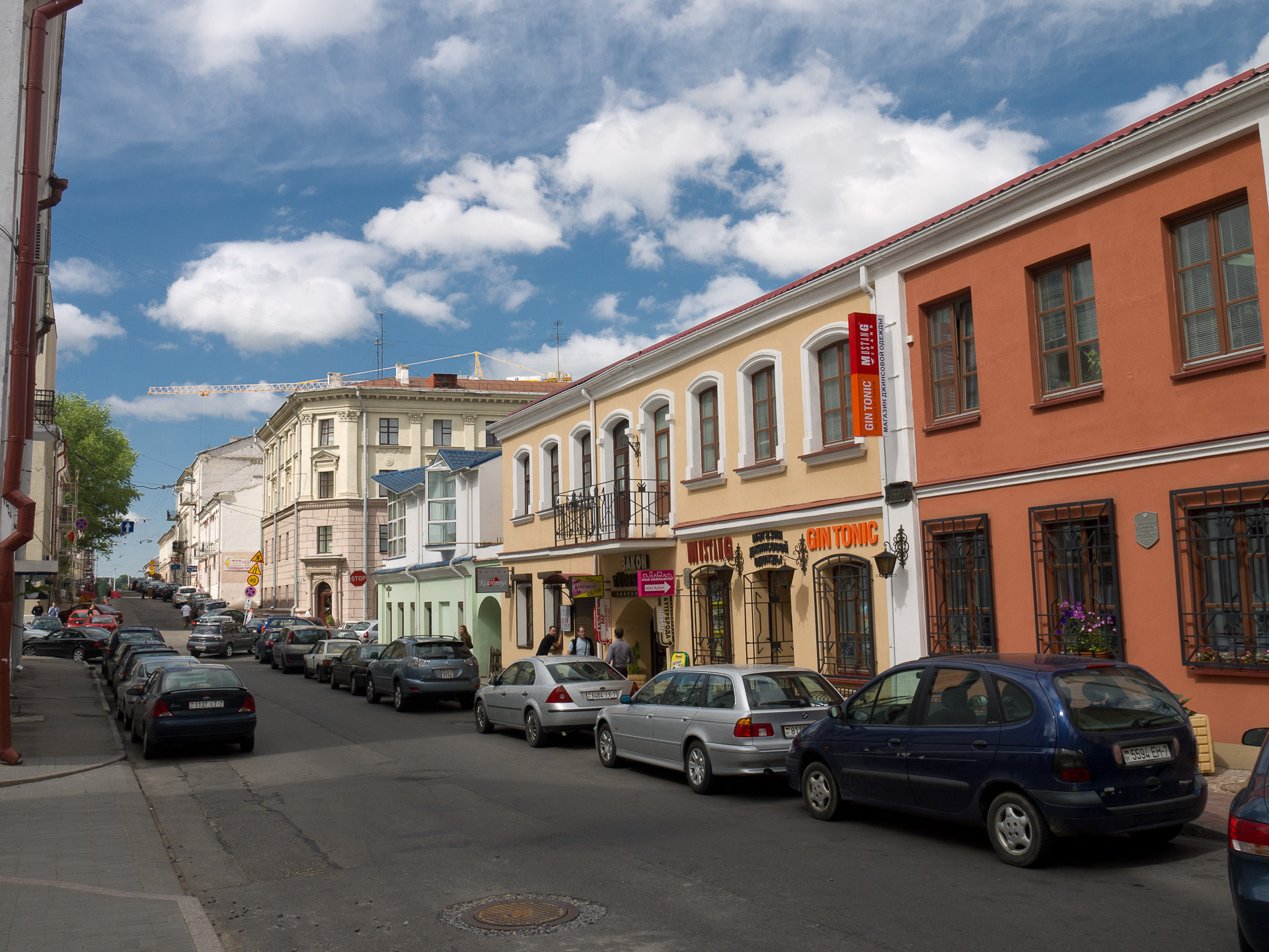 Вуліца Рэвалюцыйная ў Мінску